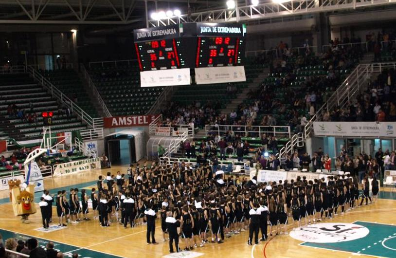 Presentación de todos los equipos de la cantera del Cáceres Patrimonio de la Humanidad en intermedio del partido que les enfrentó al primer equipo con el Tarragona 2017, disputado en marzo de 2012 y correspondiente a la jornada 29 de la liga Adecco LEB Oro 2011-12.